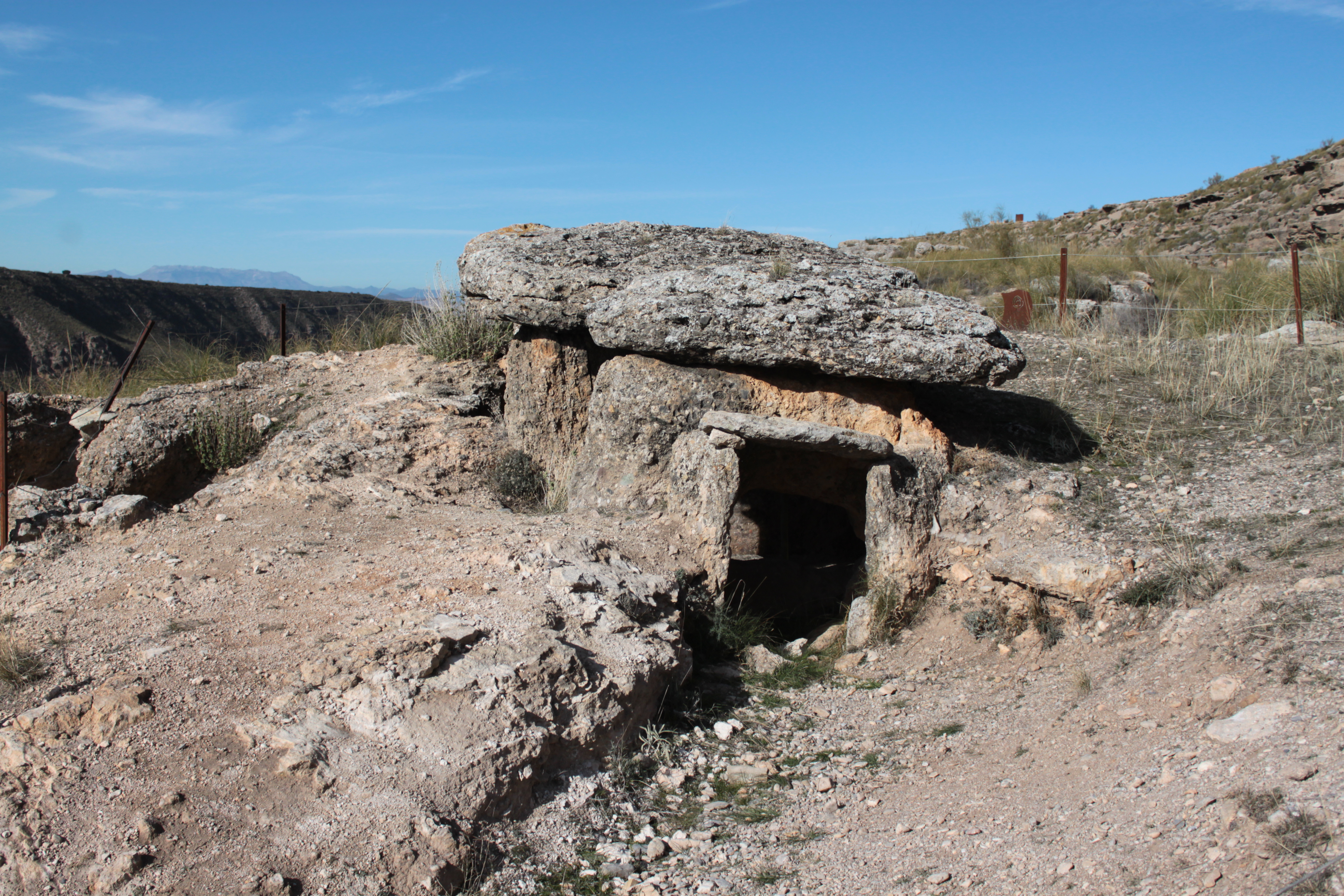 Dolmen 134 del Parque Megalítico de Gorafe situado en la Hoya del Conquil. Gorafe, provincia de Granada, Andalucía, España.